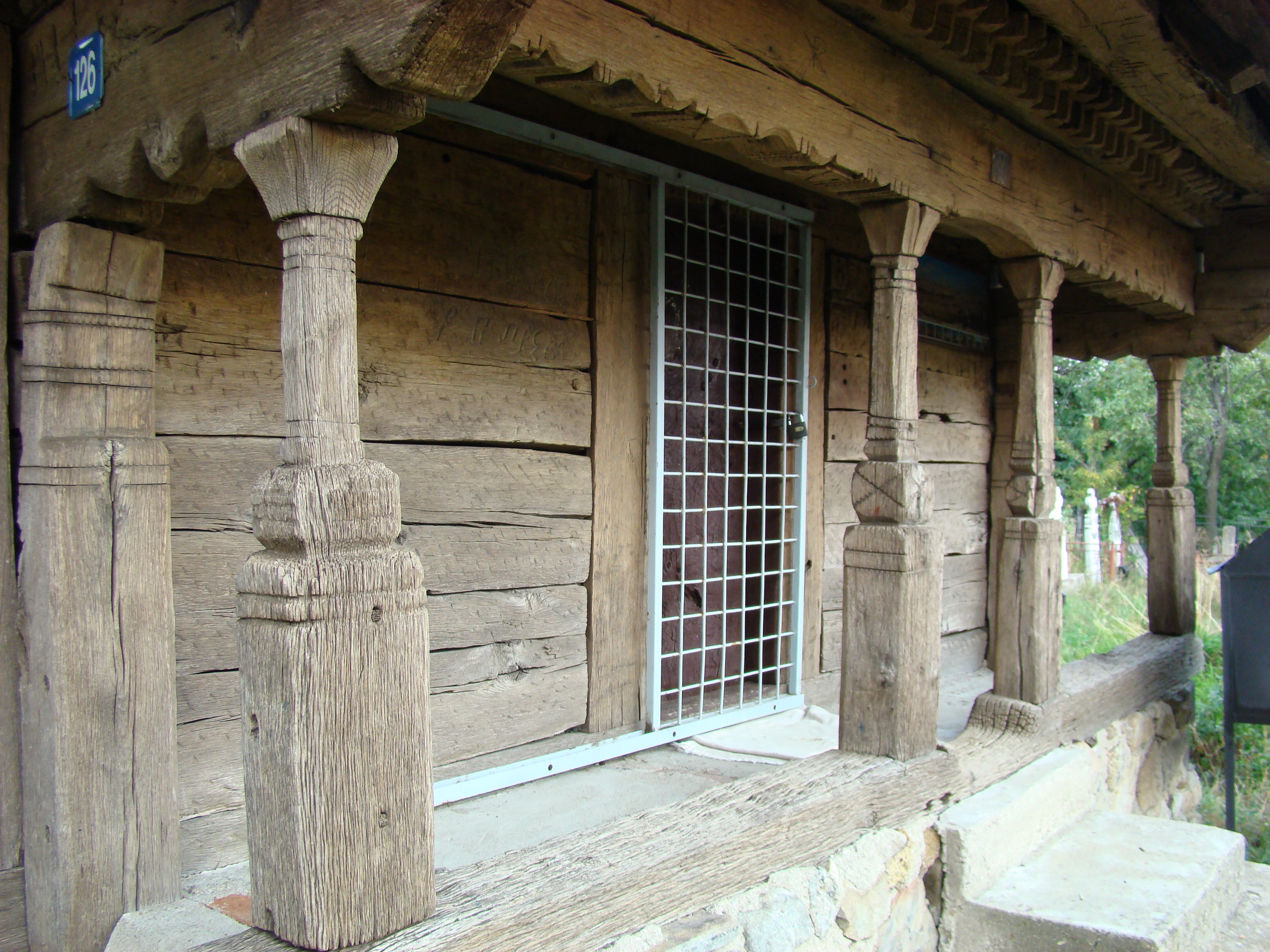 Biserica de lemn „Intrarea în Biserică” din Stâncești-Larga, Gorj